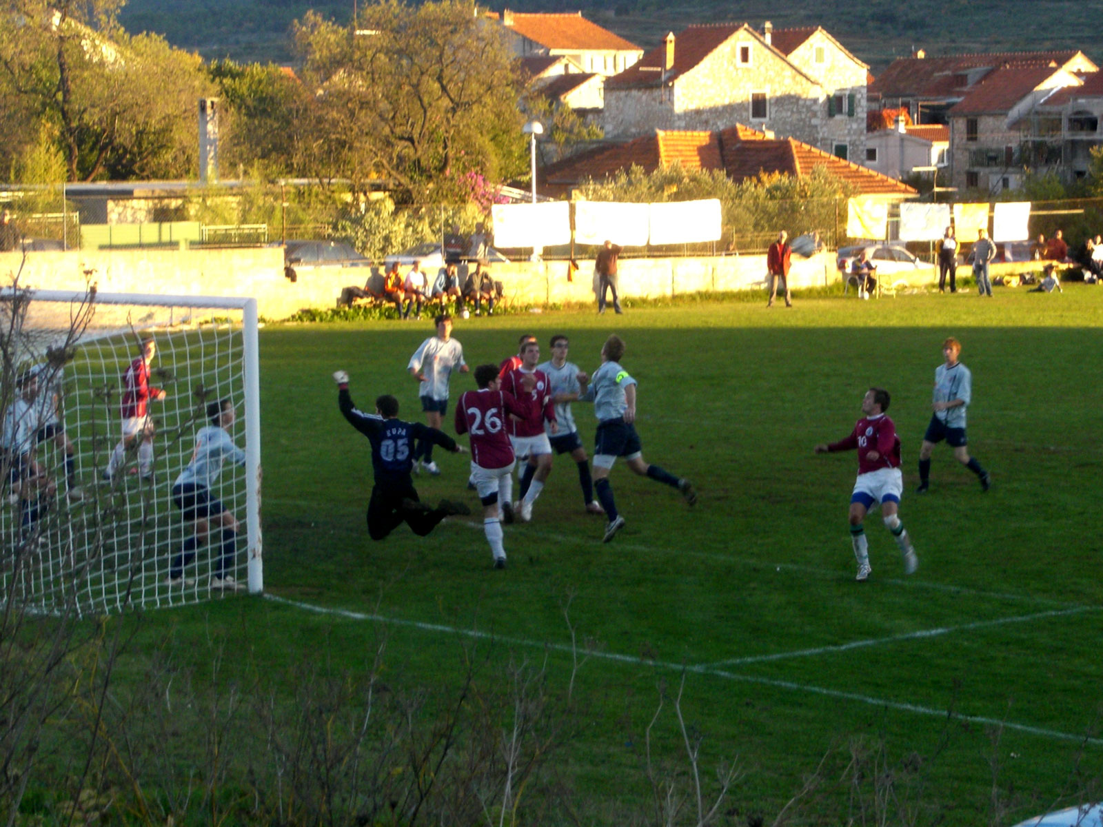 Hvarska nogometna liga, Stari Grad, 3. 11. 2007.